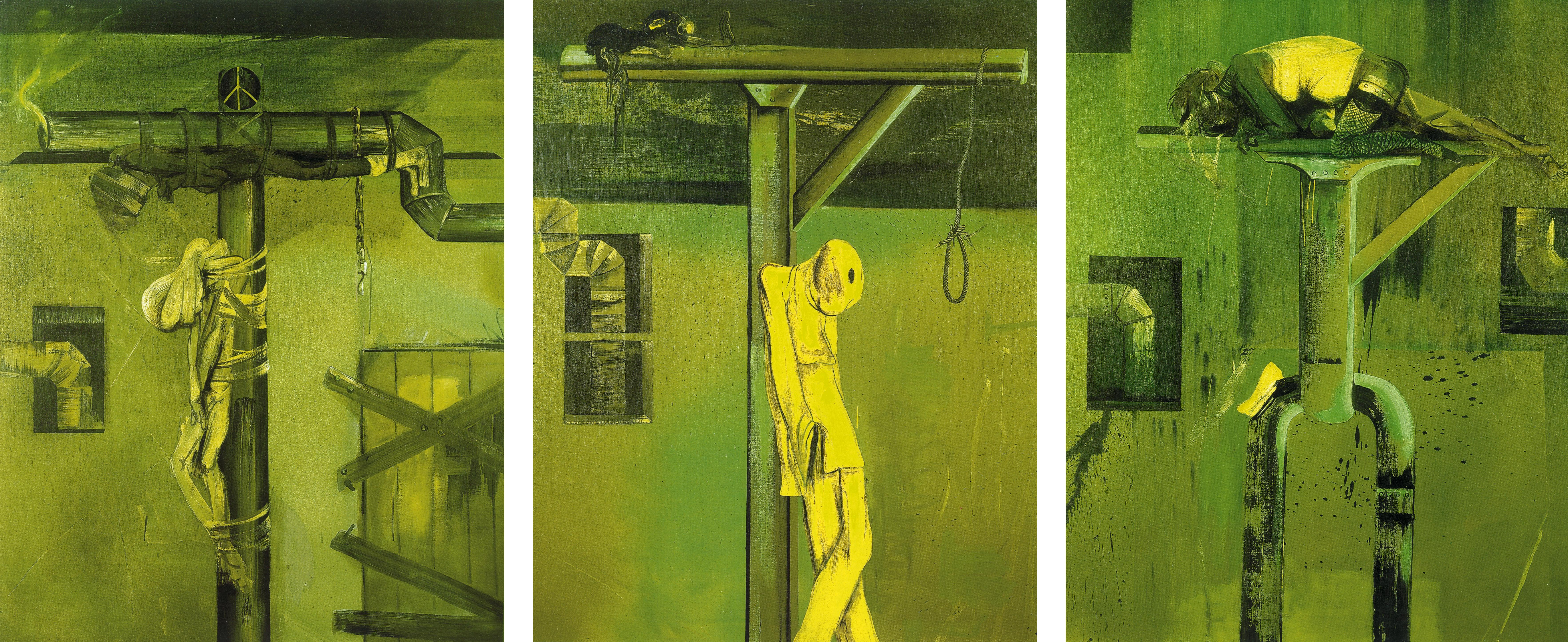 Crucifixion_n1